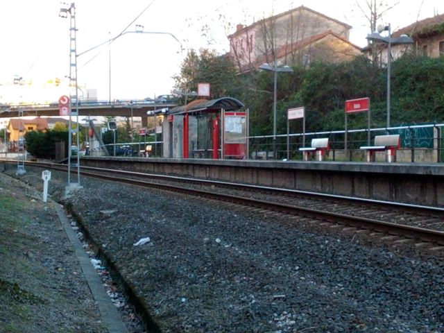 Apeadero de Maliaño en la localidad de Maliaño (Camargo), en Cantabria (España).